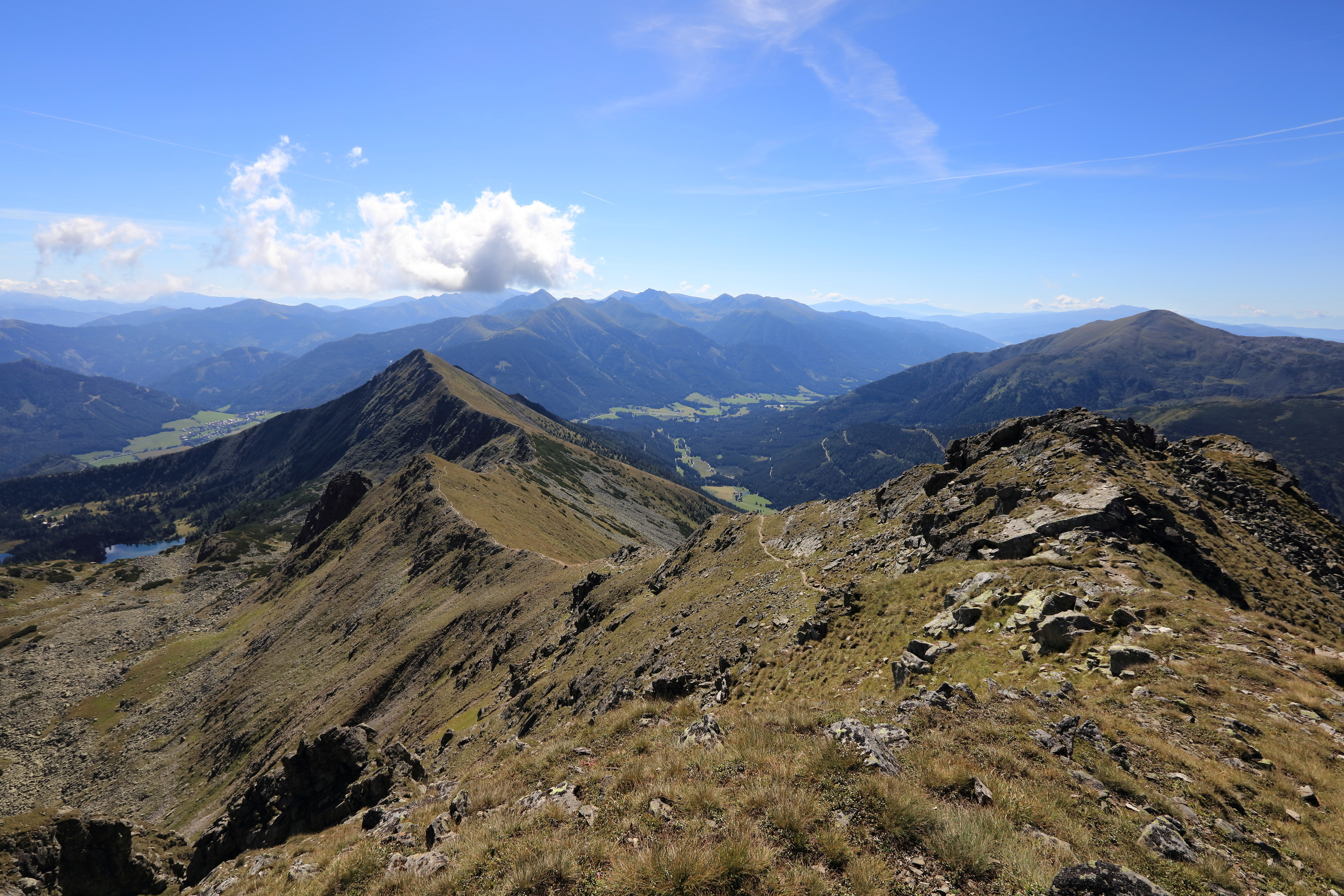 Gemeinde Hohentauern, 8785, Austria. Blick vom Abstieg vom Kleinen Bösenstein zum Großen Hengst (2159m)